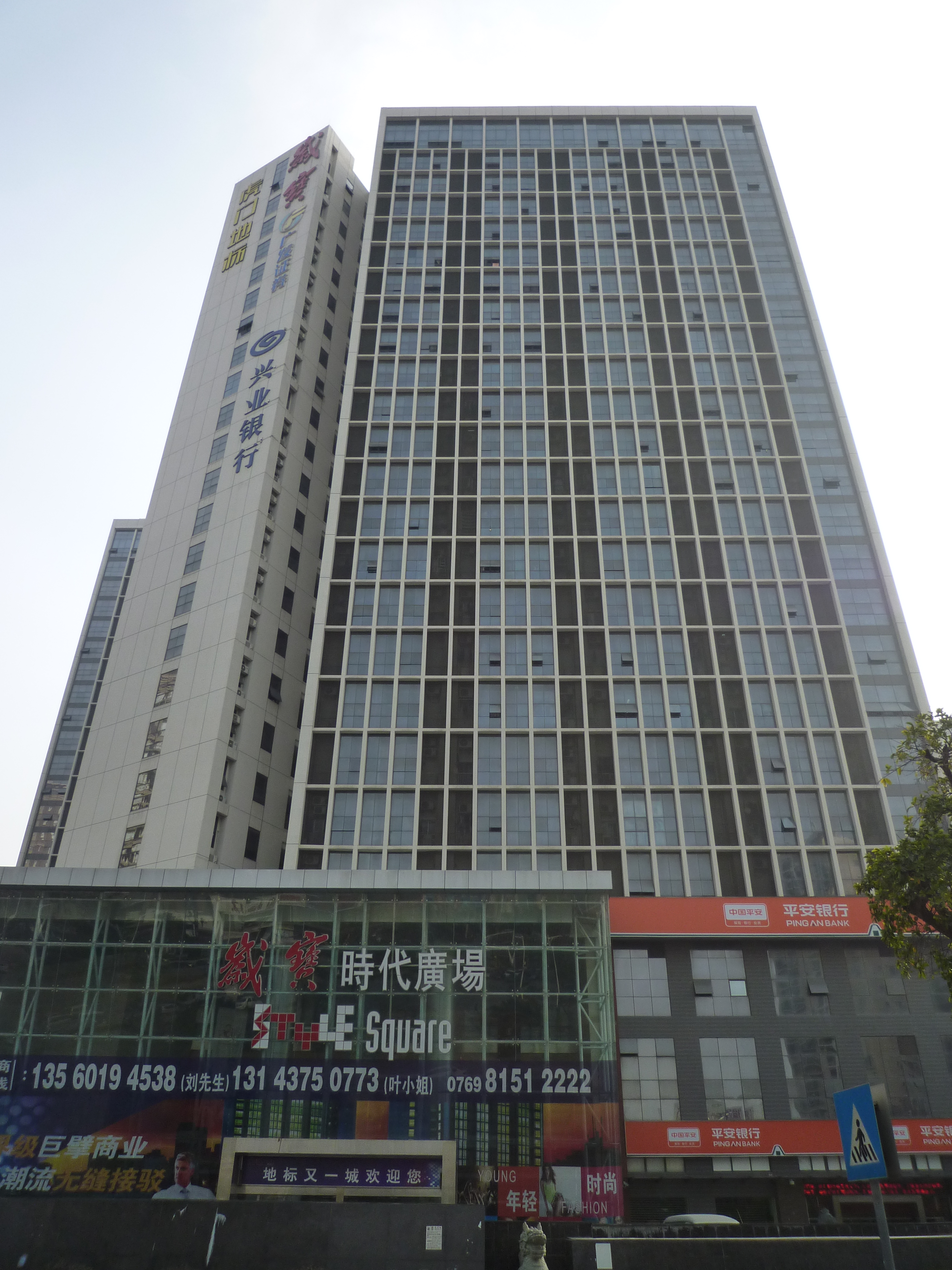 広東省東莞市虎門鎮連升中路にあるマンション付き複業施設。